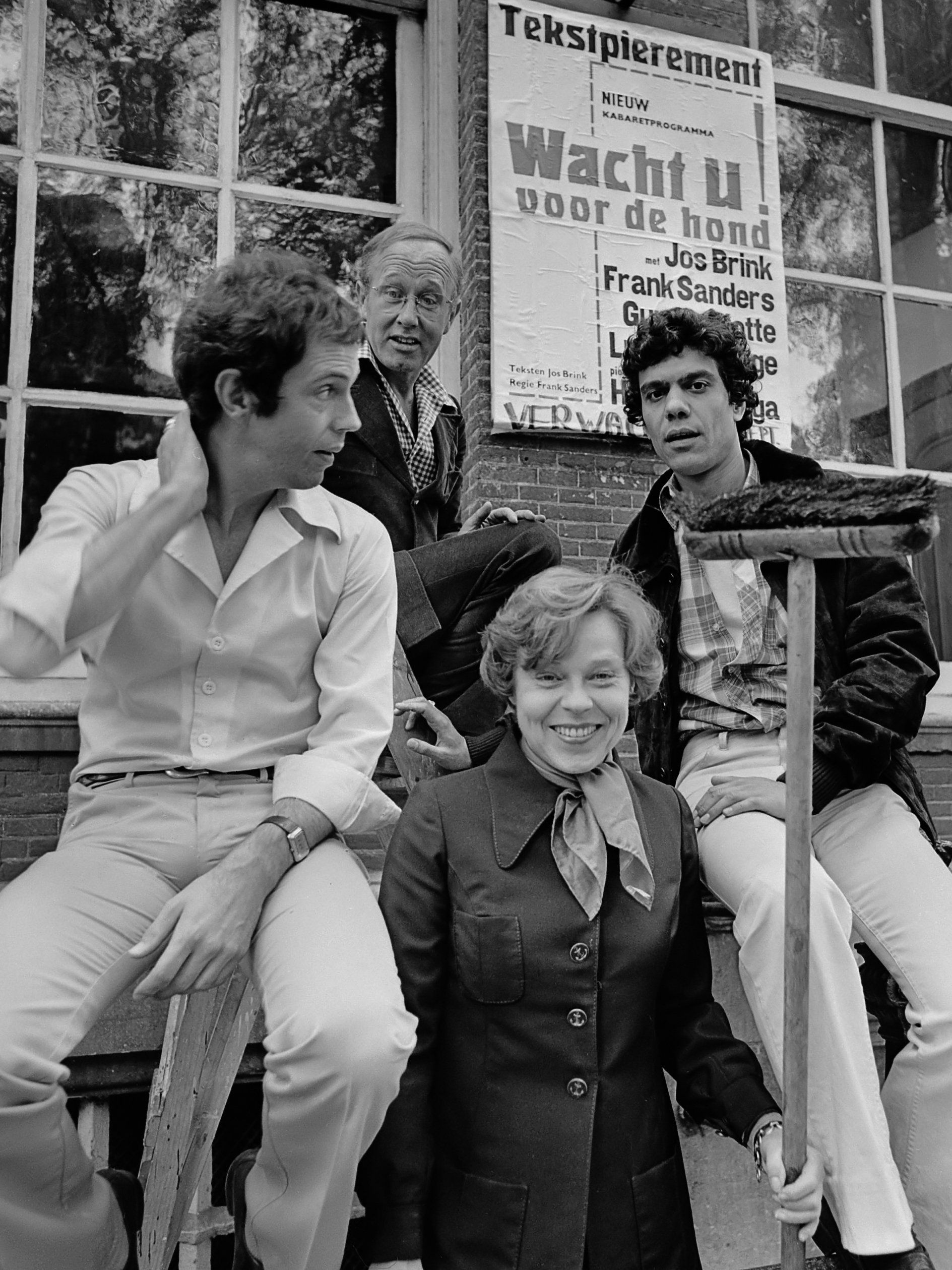 Jos Brink, Sieto Hoving, Frank Sanders en Marijke Hoving? plakken affiches bij Tingel Tangel in Amsterdam 11 augustus 1977